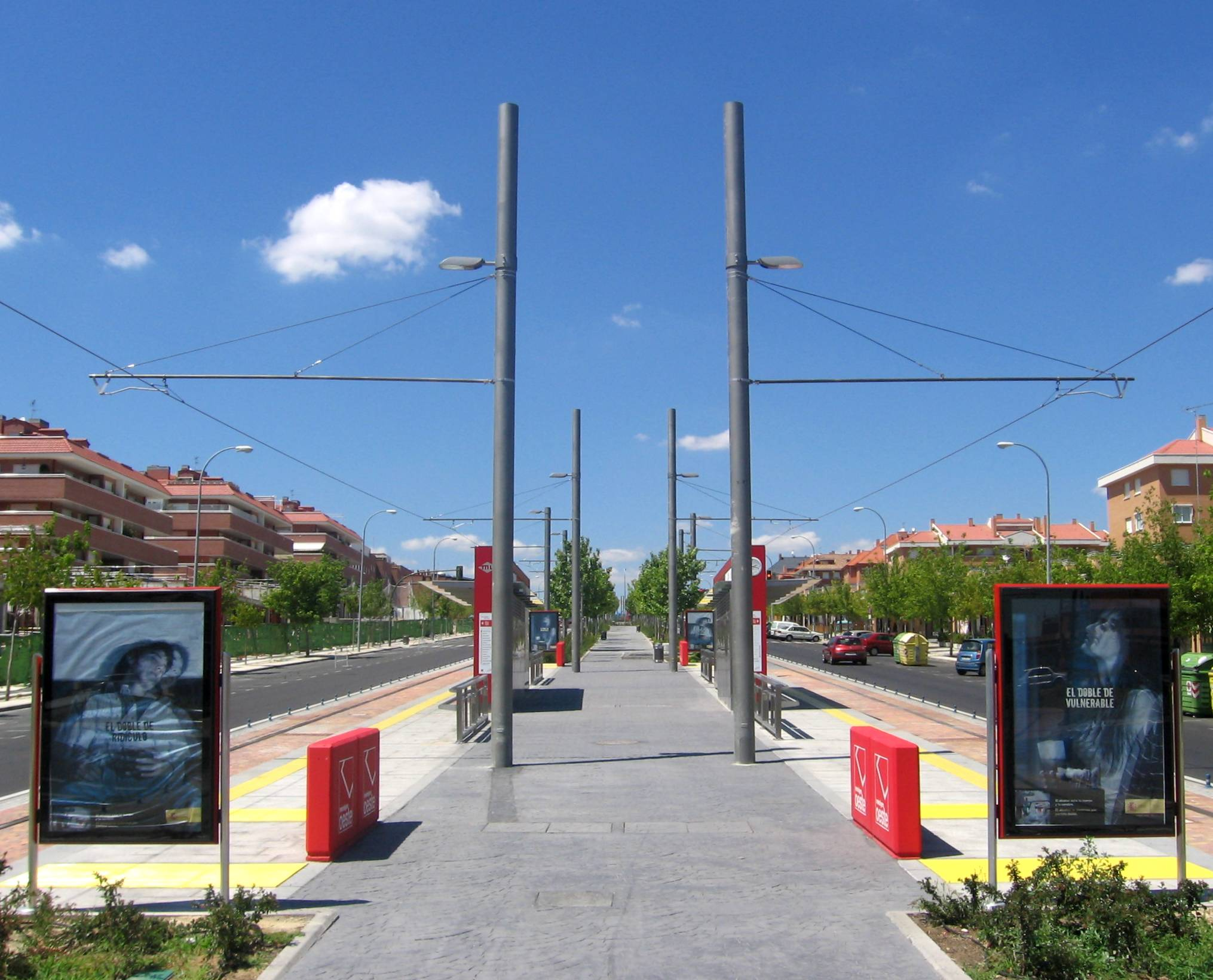 Infante Don Luis station of Madrid Light Rail. Estación de Infante Don Luis del Metro Ligero de Madrid.